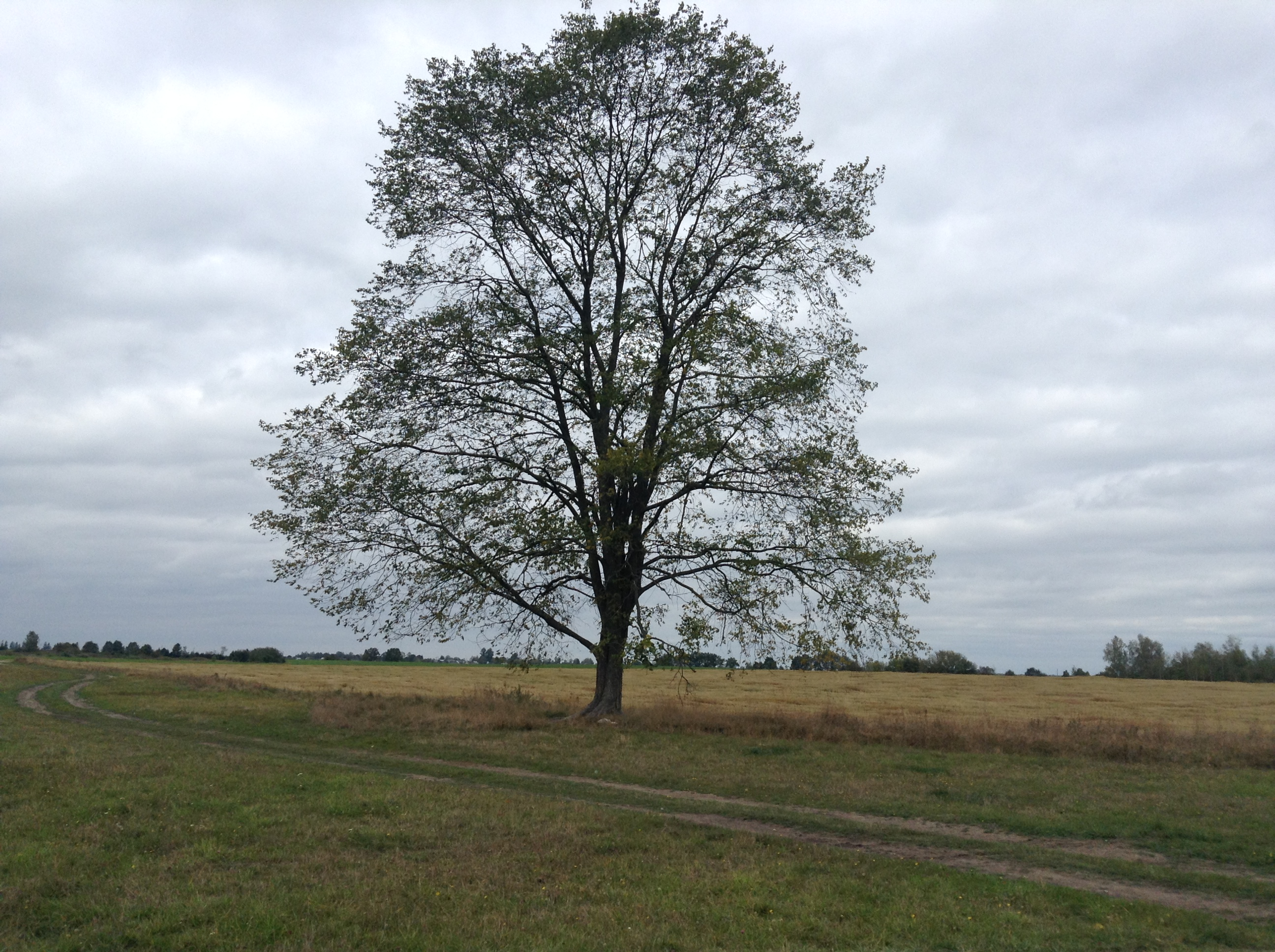 Родныя прасторы.